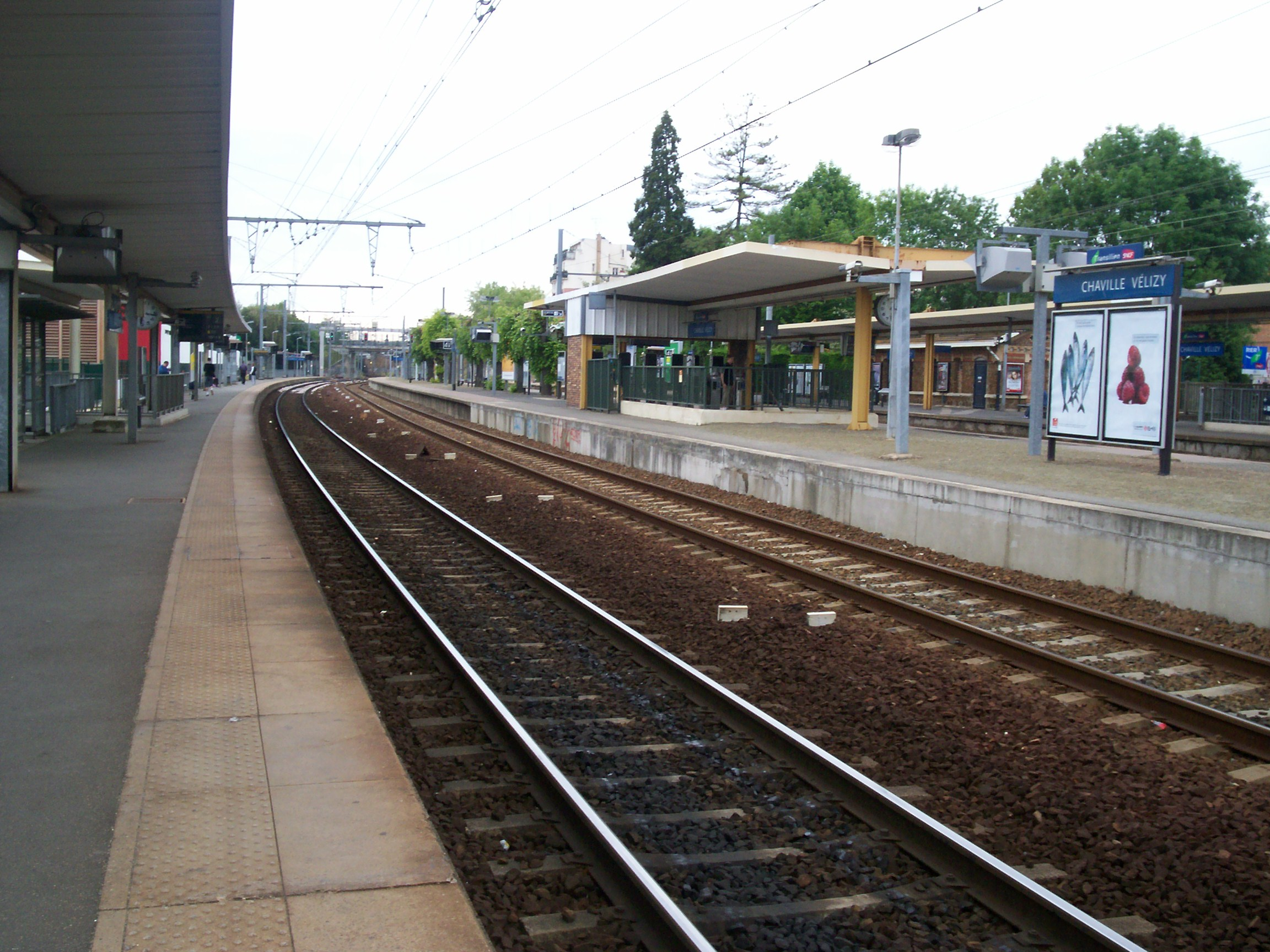 Gare de Chaville - Vélizy